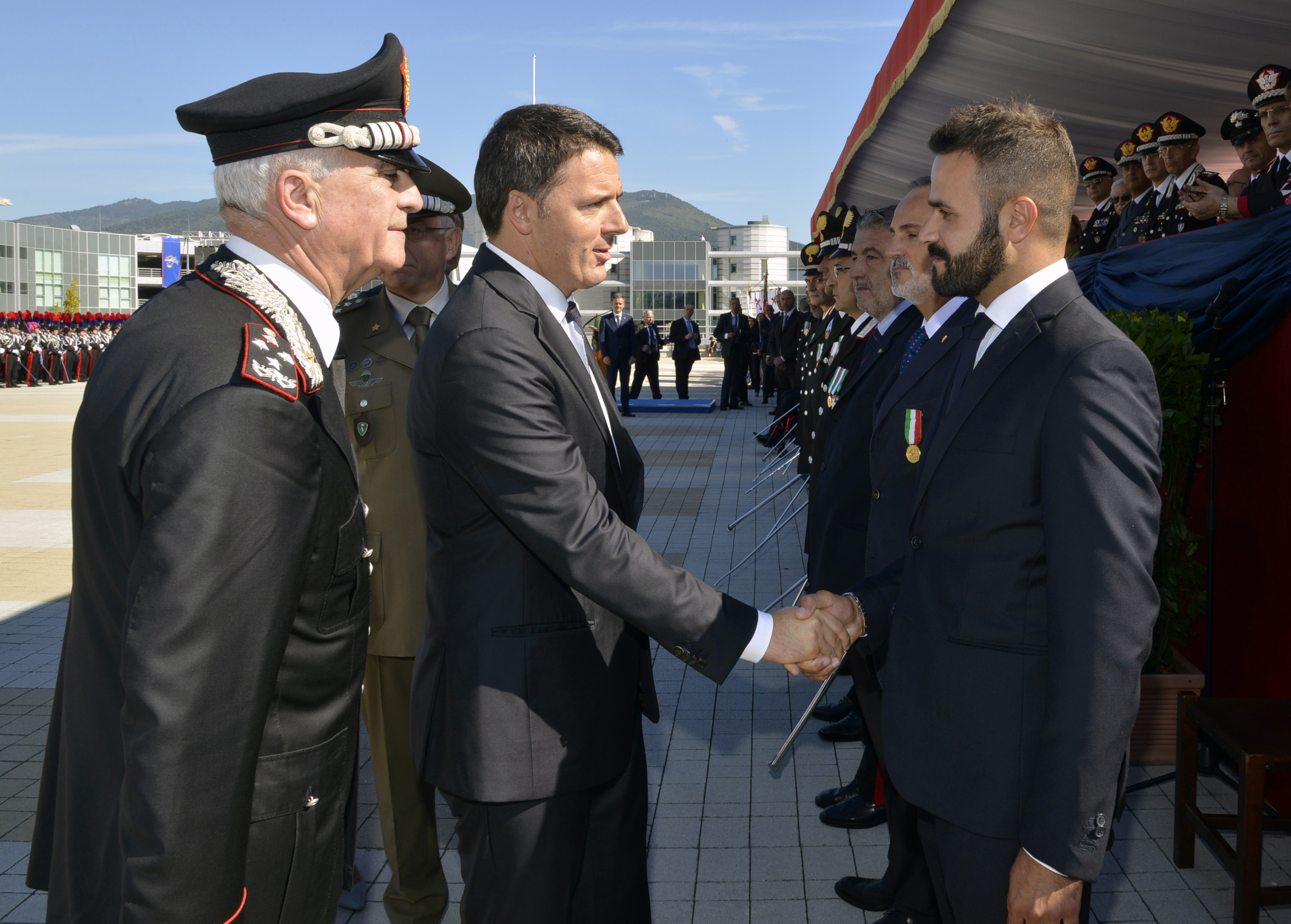 Francesco Negri con il Presidente del Consiglio dei Ministri Matteo Renzi e il Comandante Generale dell'Arma dei Carabinieri Gen. C.A. Tullio Del Sette durante la cerimonia di inaugurazione della Scuola Marescialli e Brigadieri dei Carabinieri di Firenze